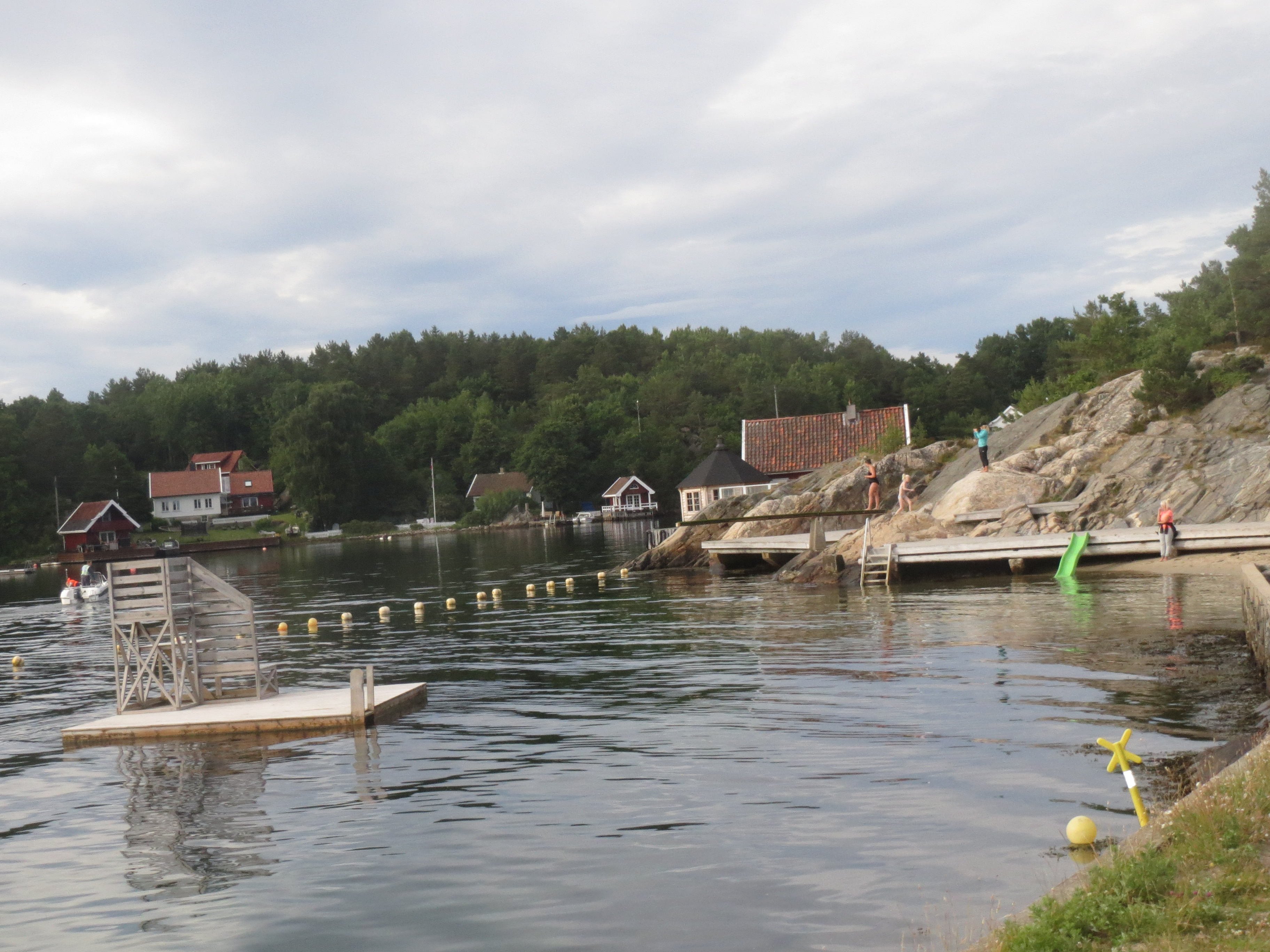 Badeplassen i Dvergsnestangen